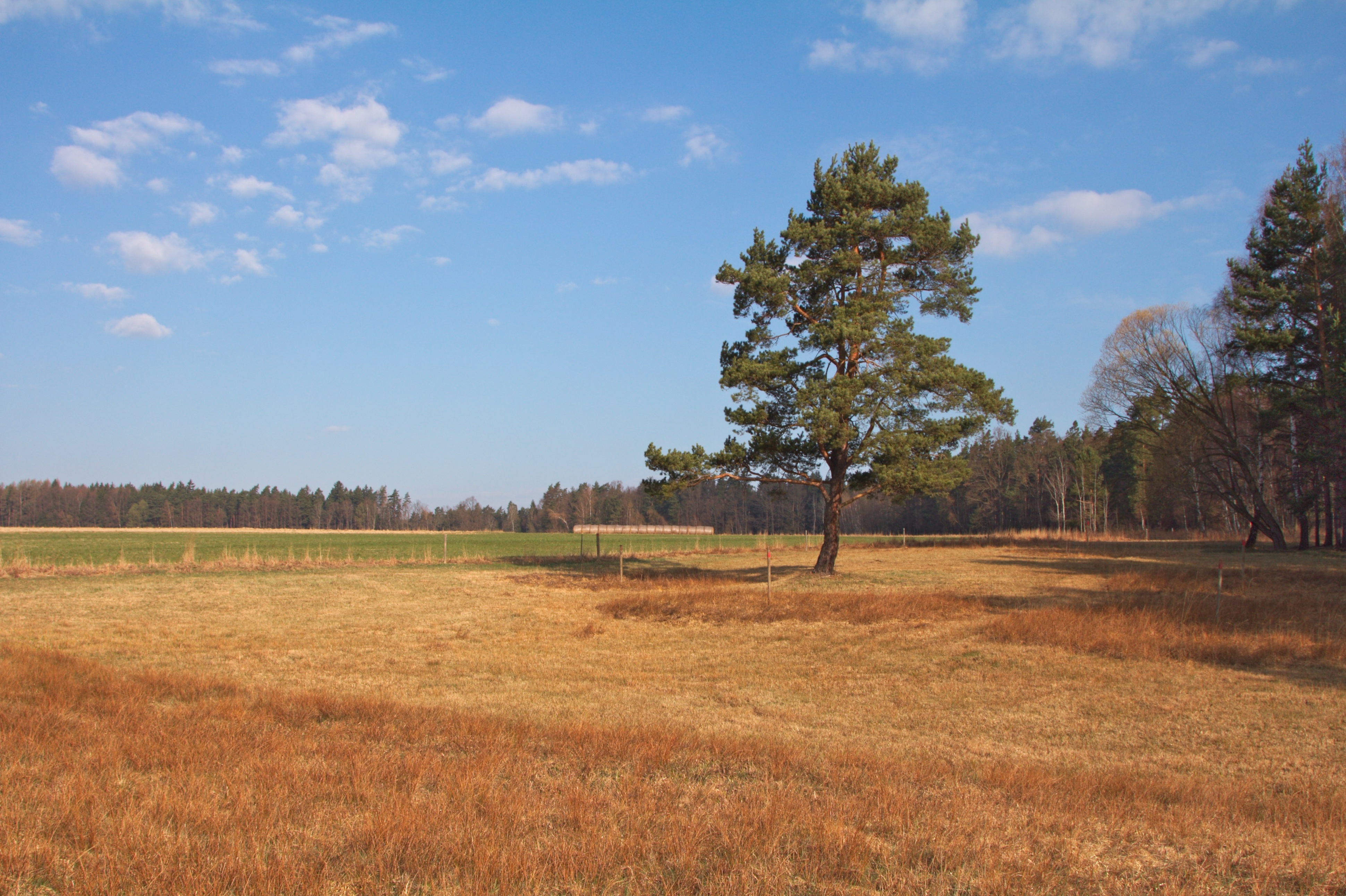 Přírodní památka Ohrazení